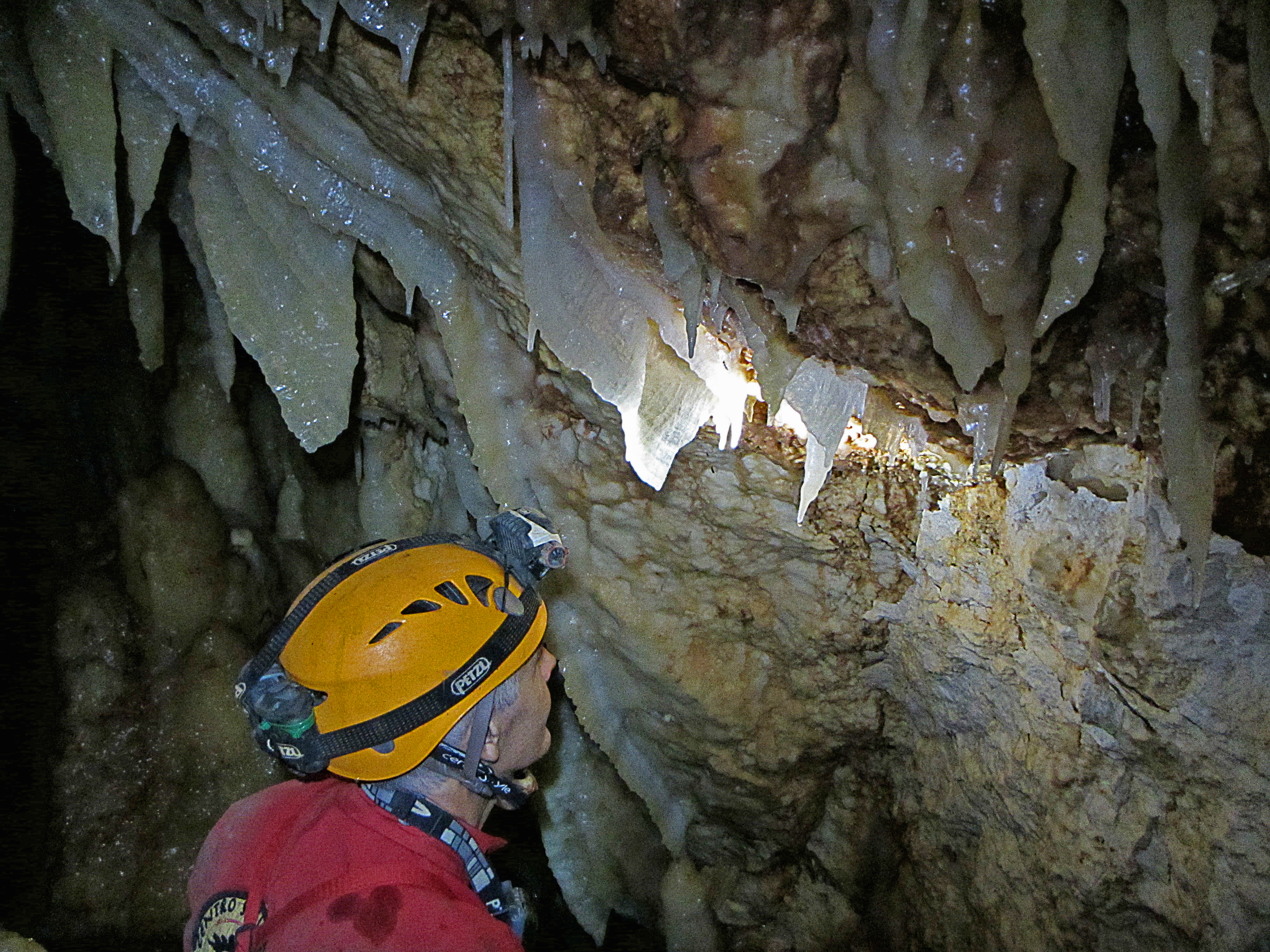 Accrescimento iniziale di una cortina calcitica nella Grave di Santa Lucia a Monopoli